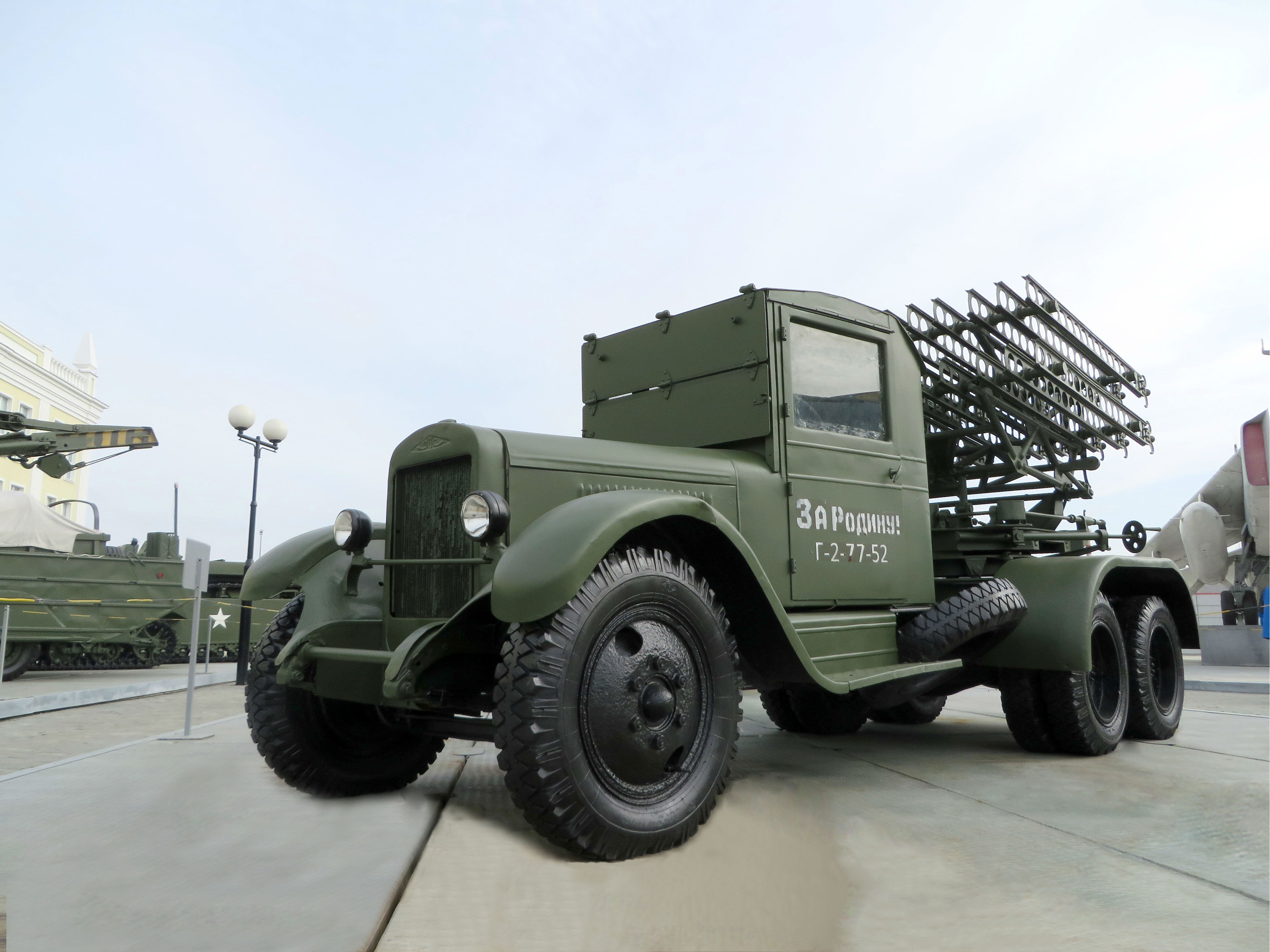 Боевая машина реактивной артиллерии БМ-8-48 (макет)